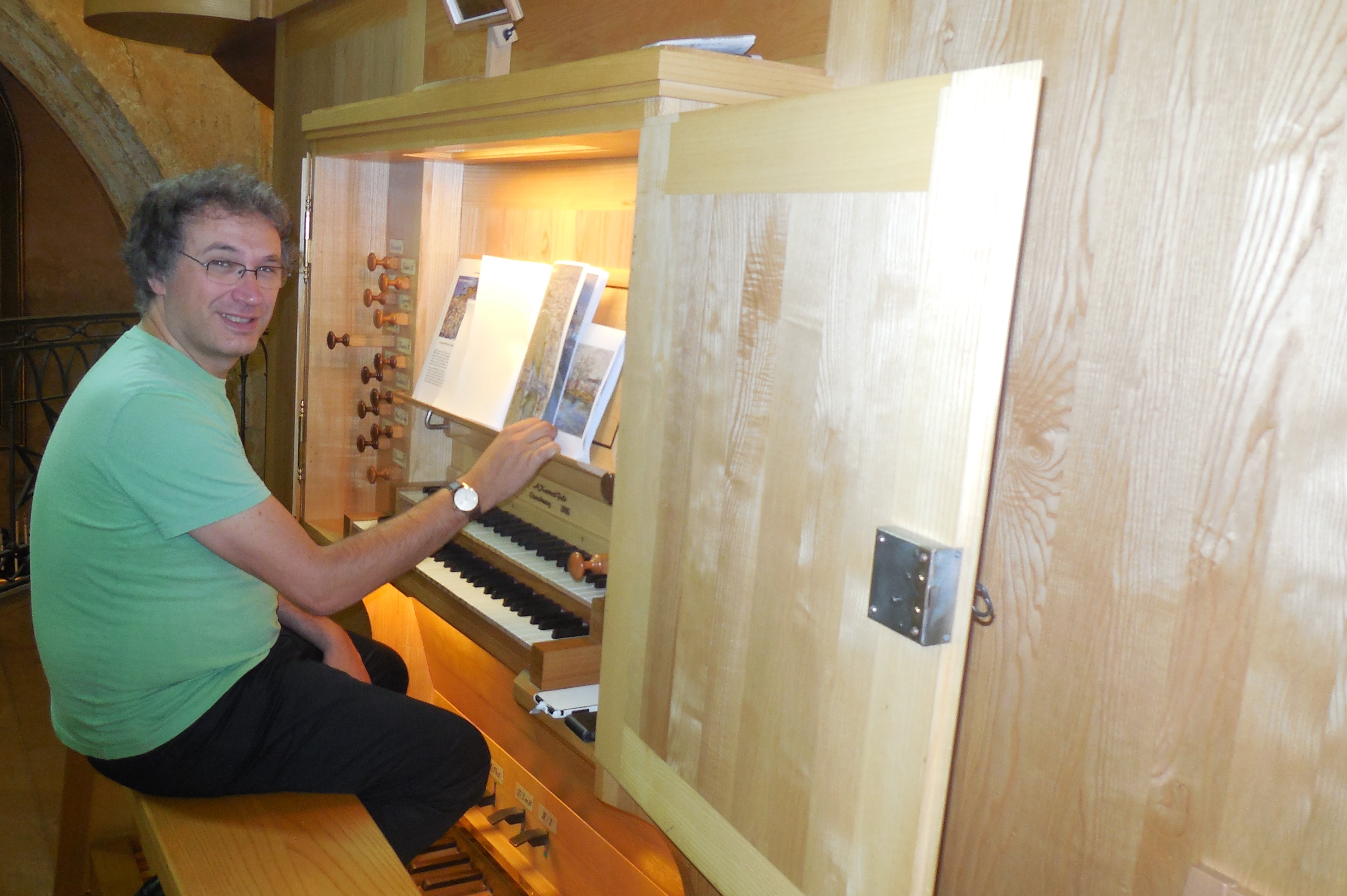 Concert d'orgue de Thierry Escaich à l'orgue de saint Jean de Malte en répétition pour le concert donné à l'occasion du 25ème anniversaire de la chute du mur de Berlin, improvisation sur les œuvres de Vincent Roux, "Les Treize Europe".